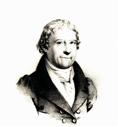 Haberle Károly Konstantin Keresztély természetkutató, botanikus, bölcselet- és orvosdoktor, egyetemi tanár